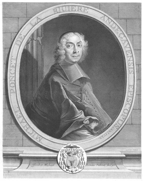 Portrait de l'évêque d'Angers en buste de trois quart